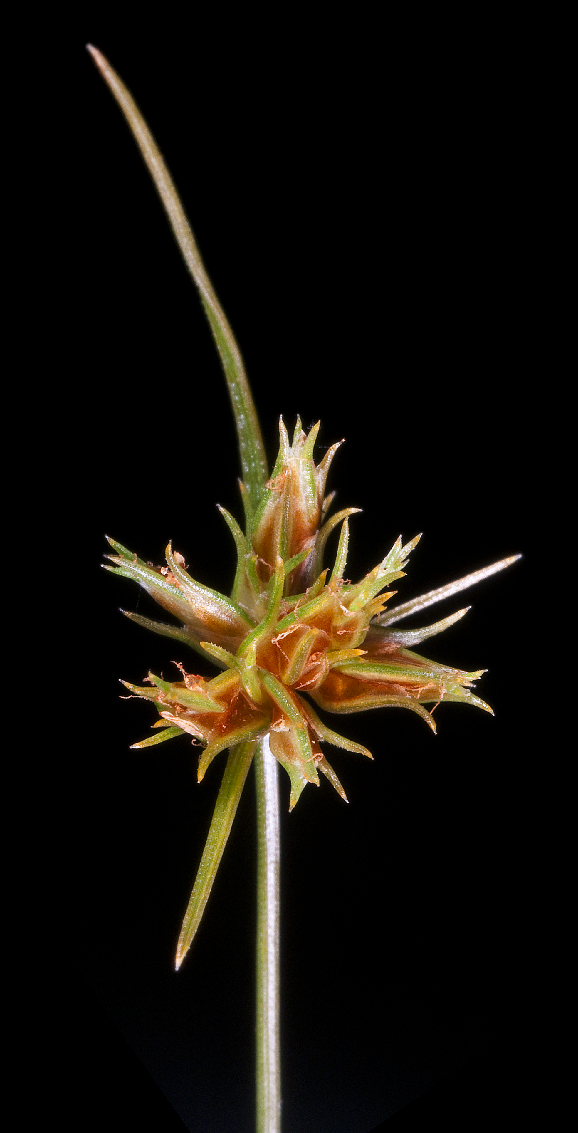 KRT4609